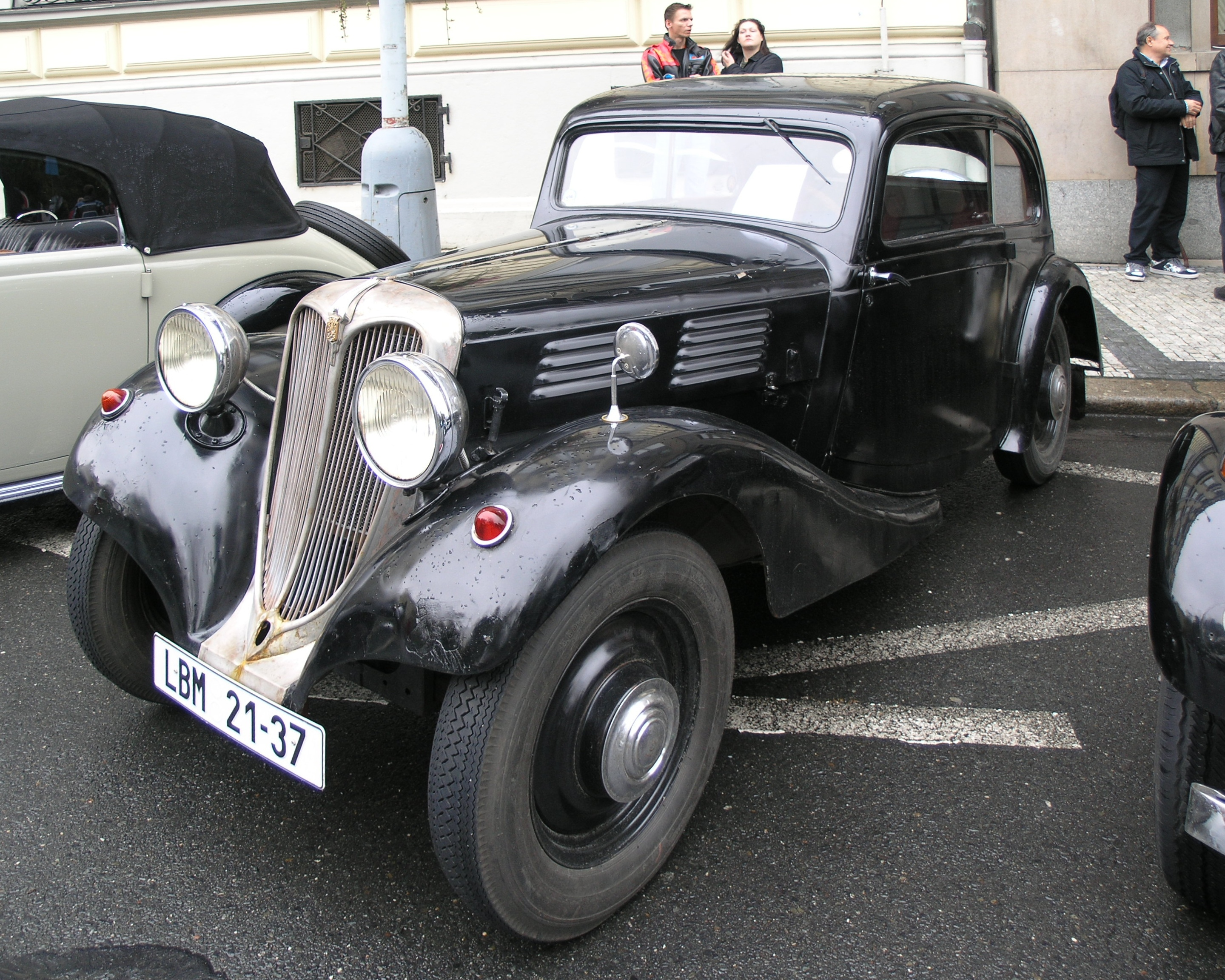 Vůz Praga Baby (1937) účastnící se jízdy veteránů u příležitosti 90. výročí vzniku samostatného Československa, 28. října 2008